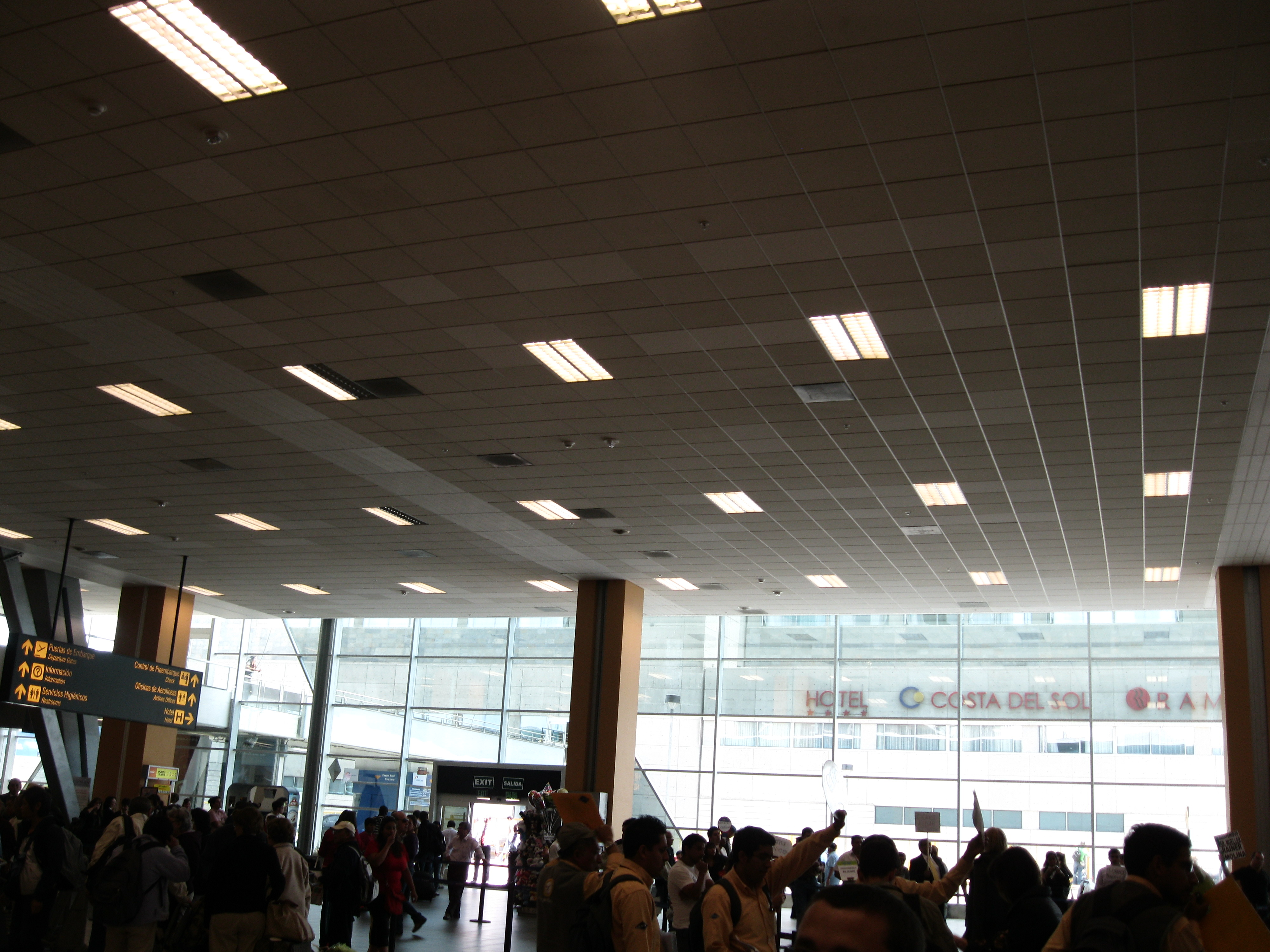 Aeropuerto Internacional Jorge Chávez